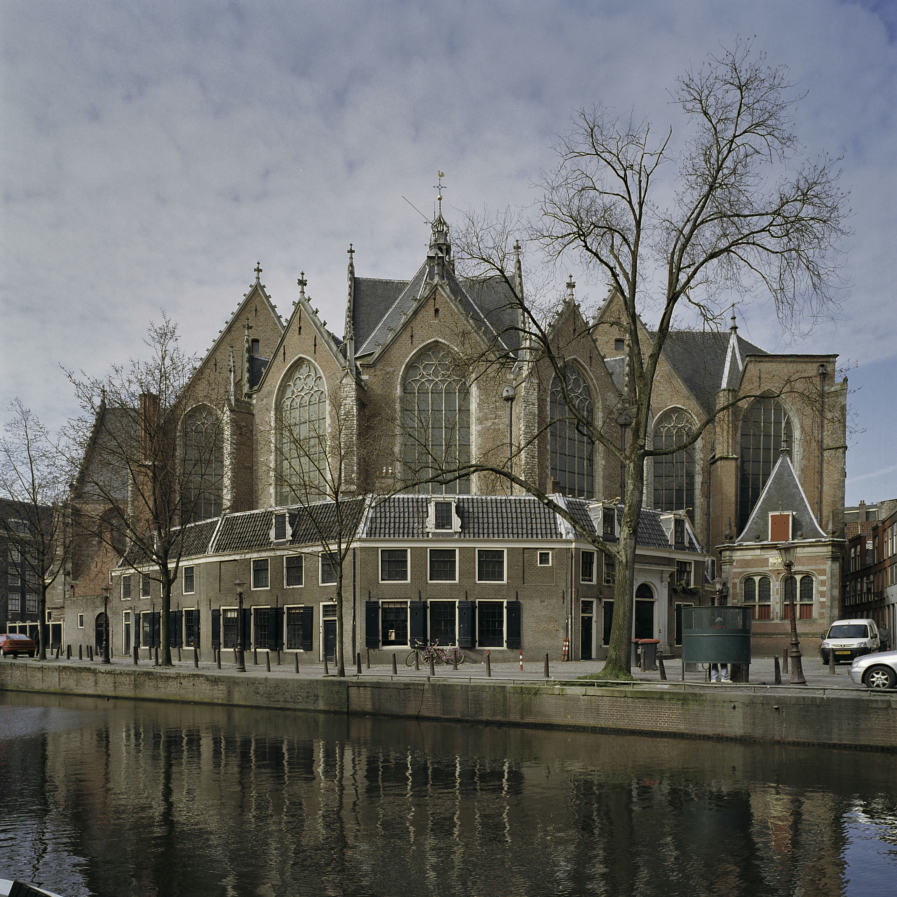 Oude kerk: Overzicht vanaf de Oudezijds Voorburgwal op de kerk (opmerking: Gefotografeerd voor Monumenten In Nederland Noord-Holland)